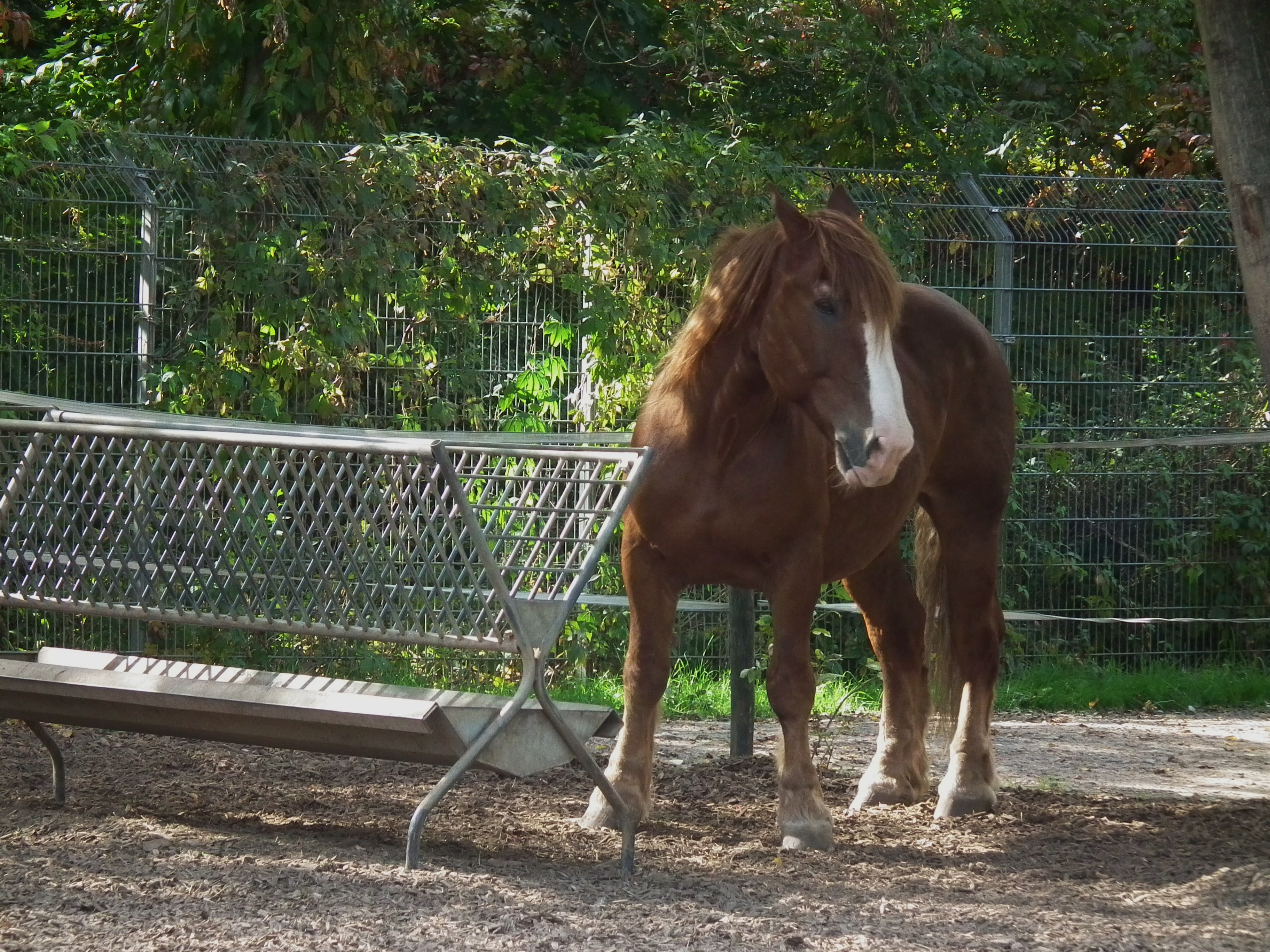 Pfalz Ardenner Kaltblut im Tiergarten Worms (Rheinland-Pfalz, Deutschland)